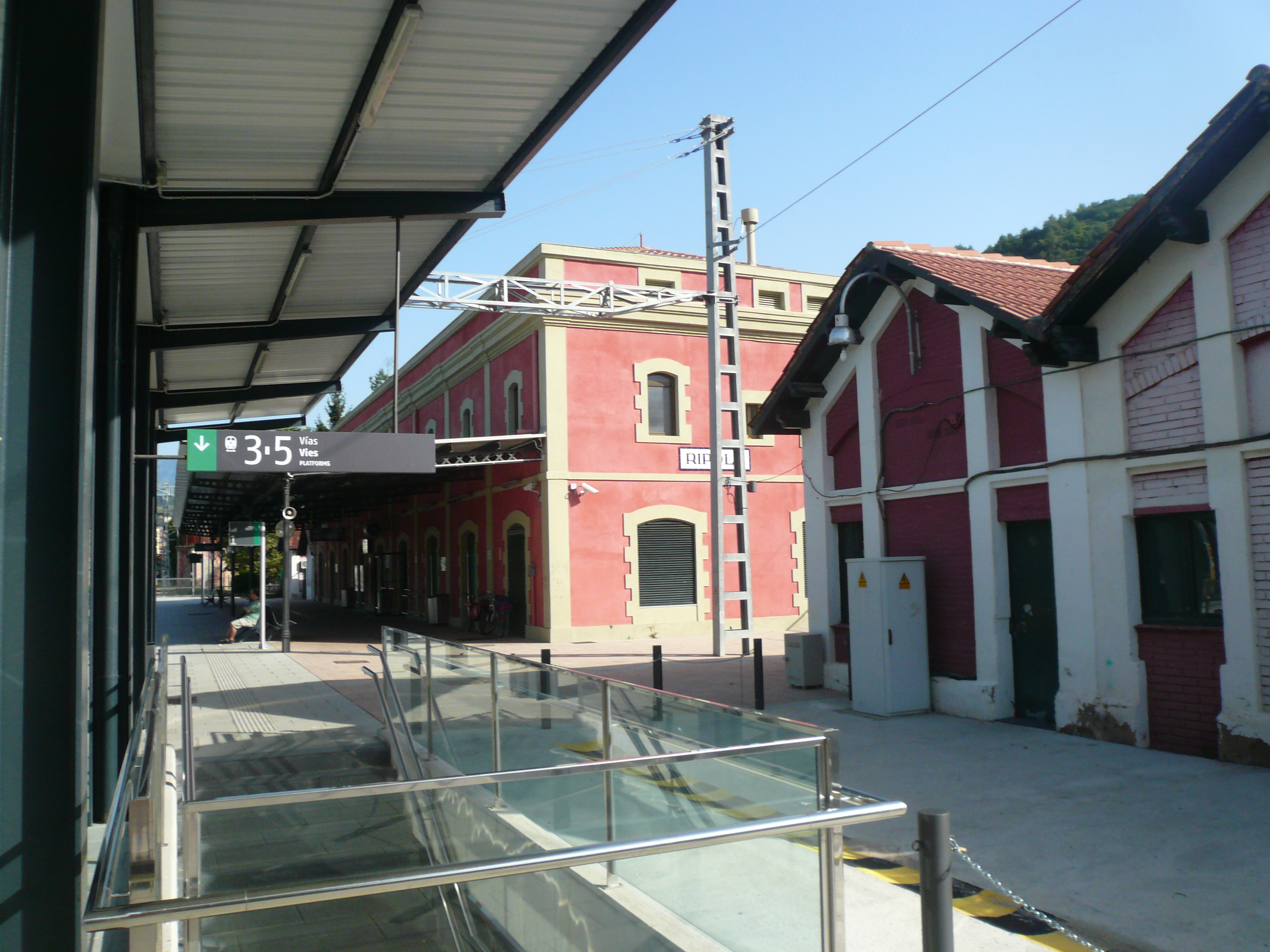 Estació vella de Ripoll. C. Progrés (Ripoll).